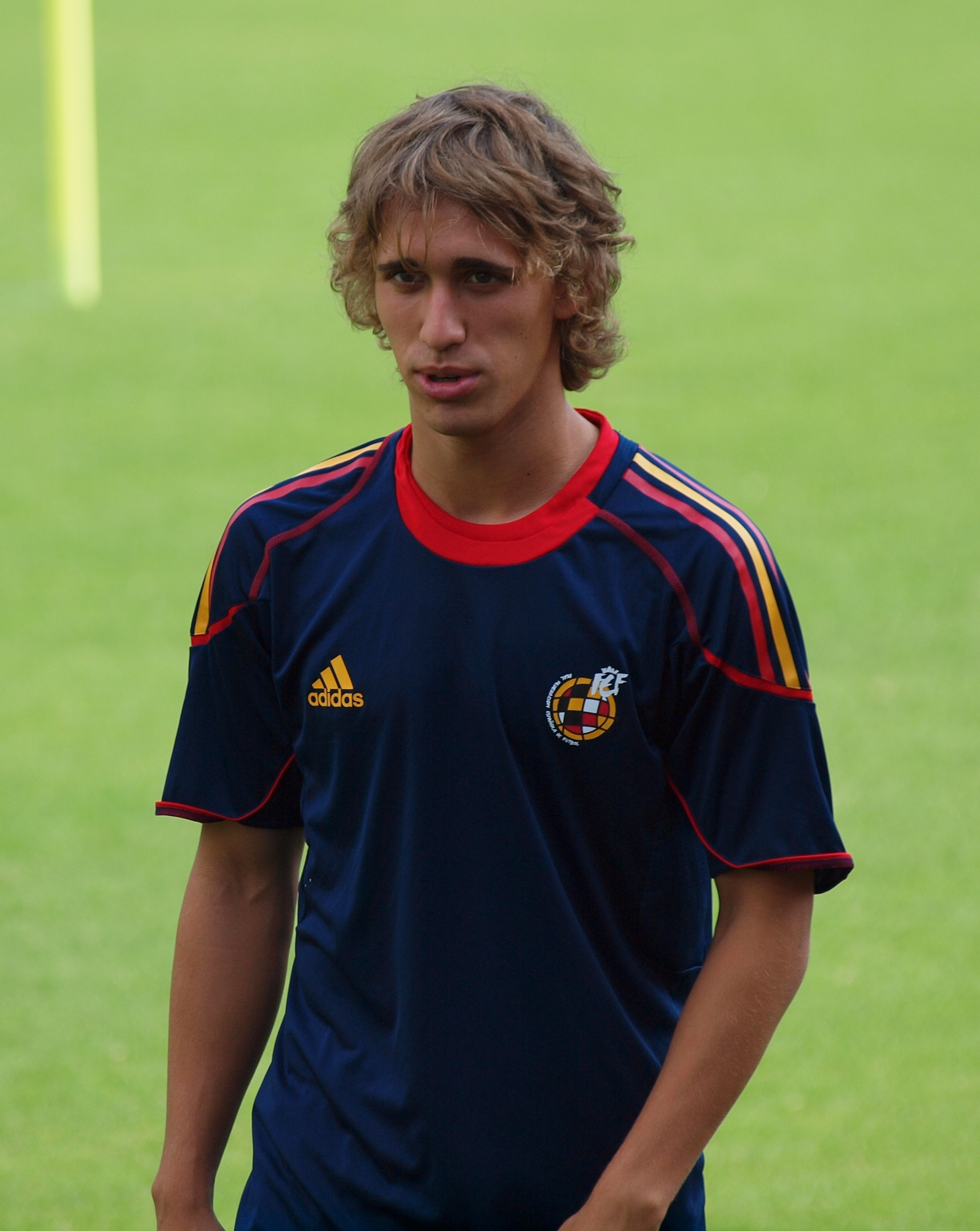 Marc Muniesa